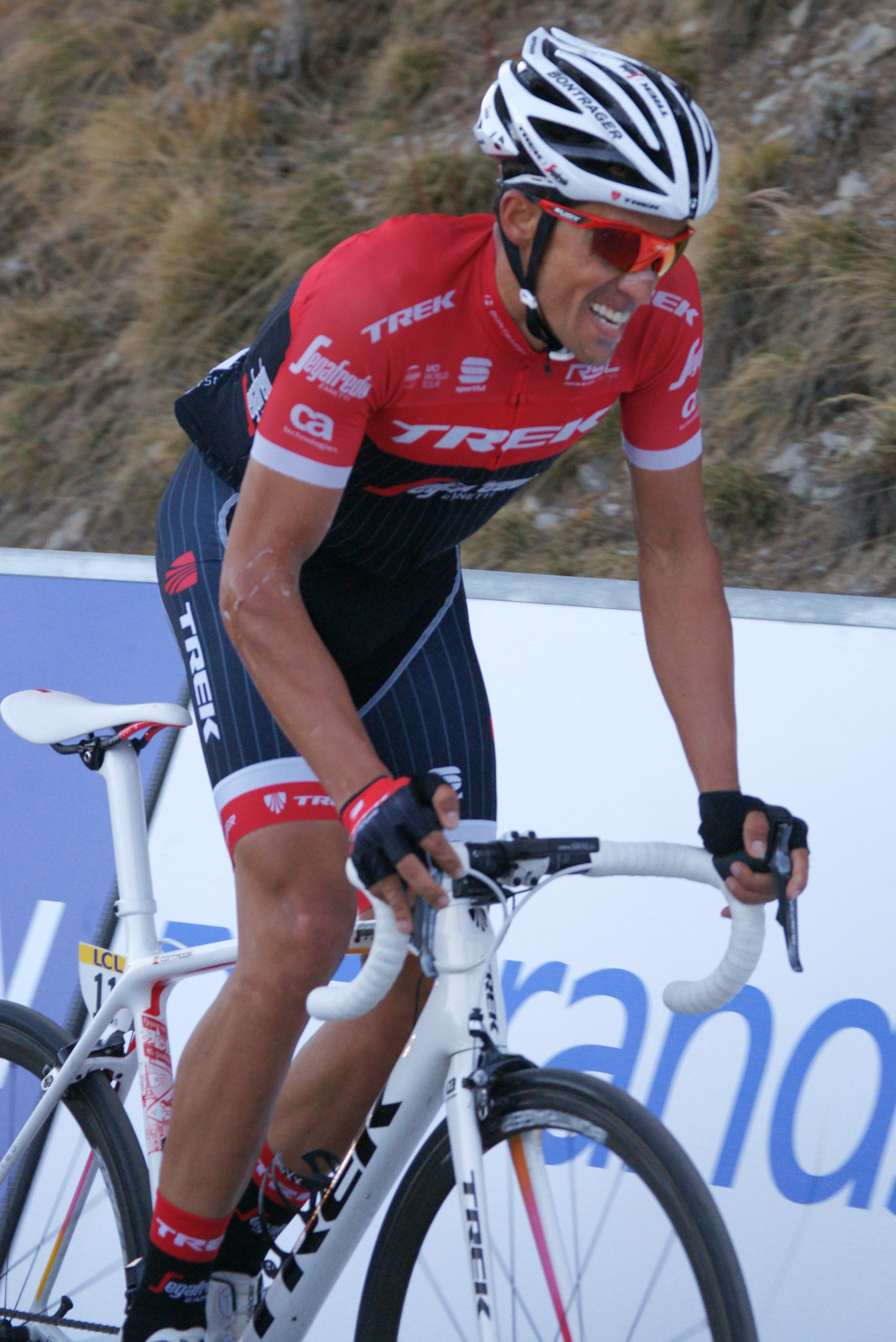 Alberto Contador Roubion Paris-Nice 2017